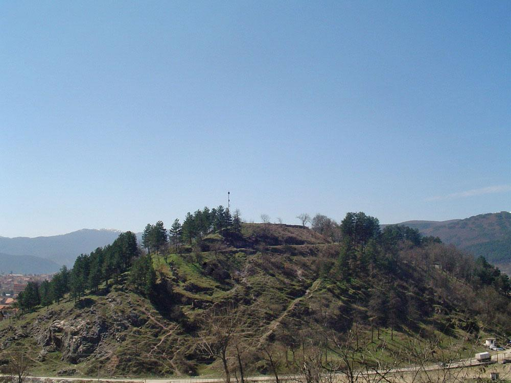 Китино кале